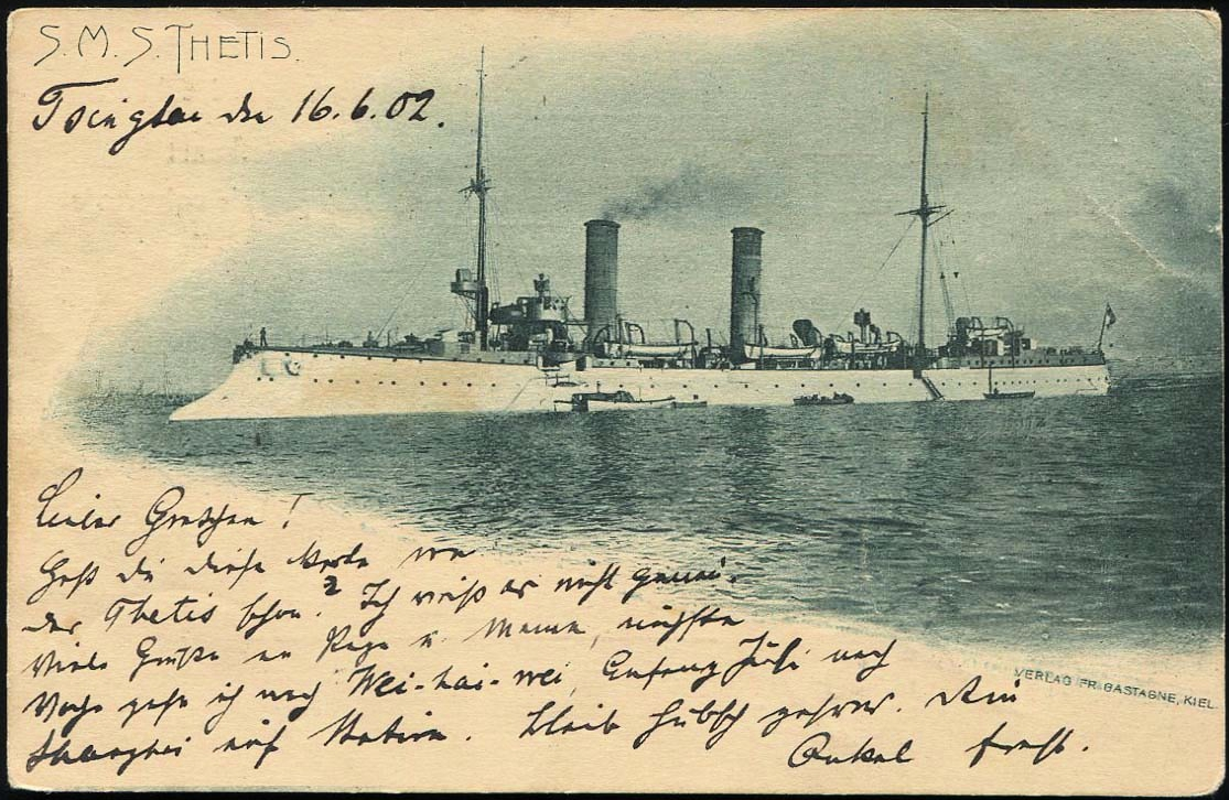 德国海军忒提斯号防护巡洋舰